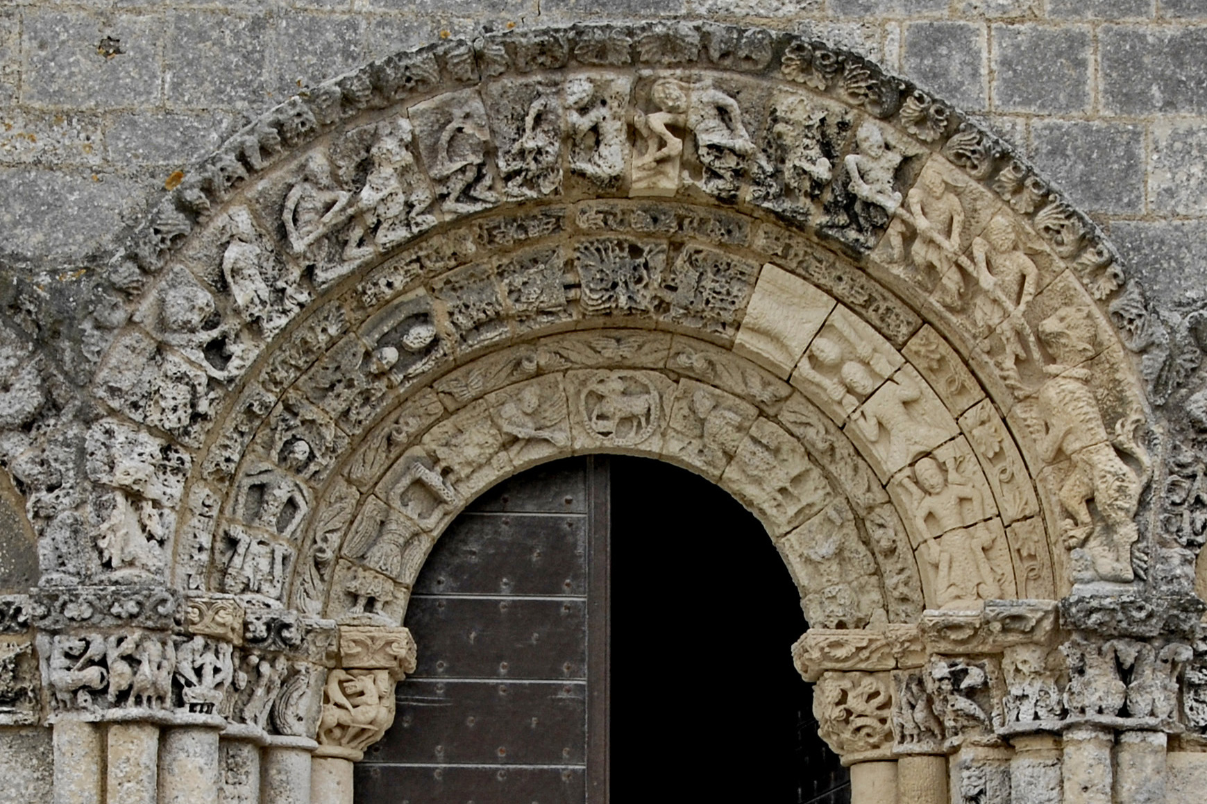 Sainte-Radegonde-Talmont-sur-Gironde, Archivolten Hauptportal